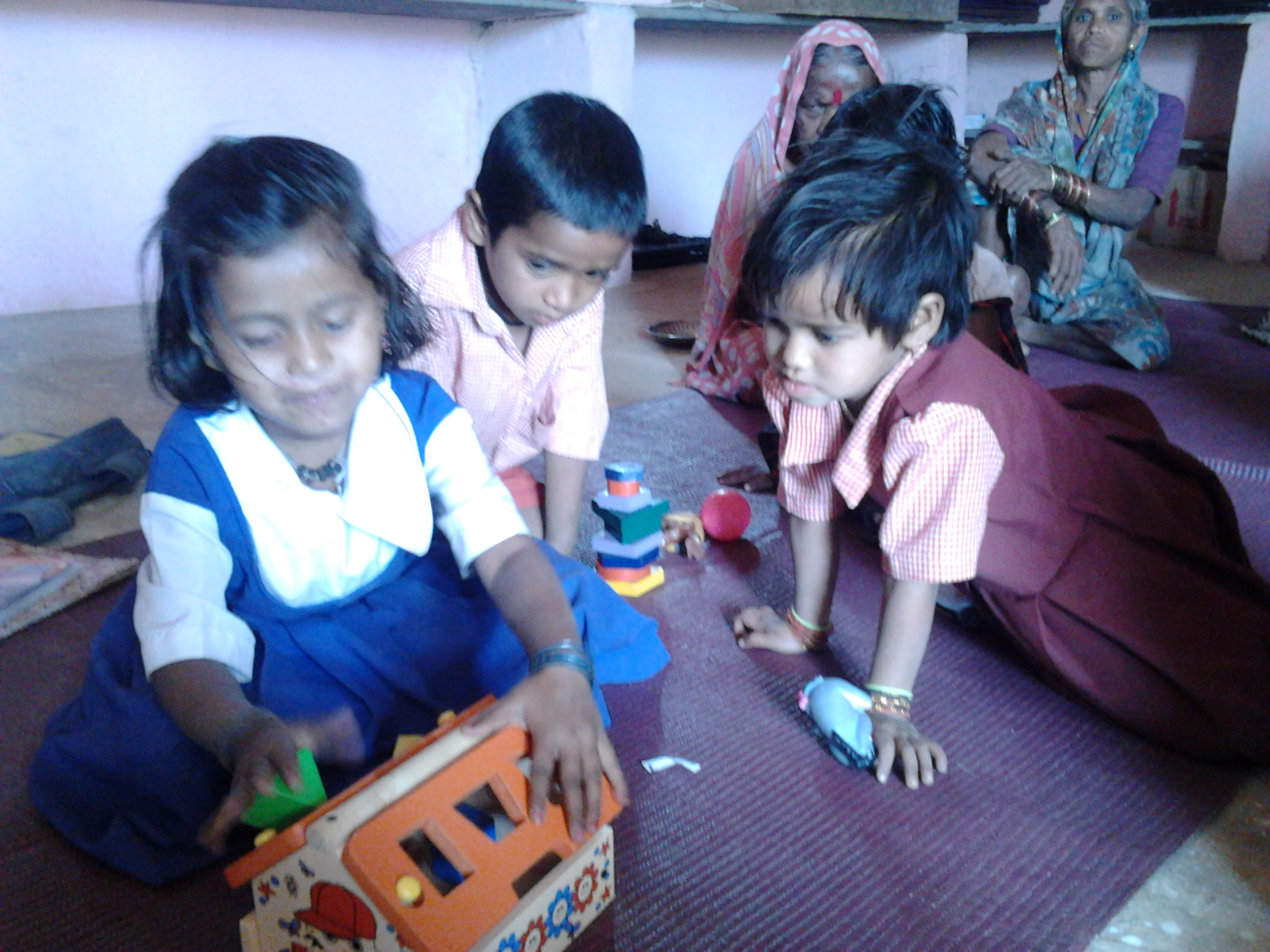 गावातील बालवाडी